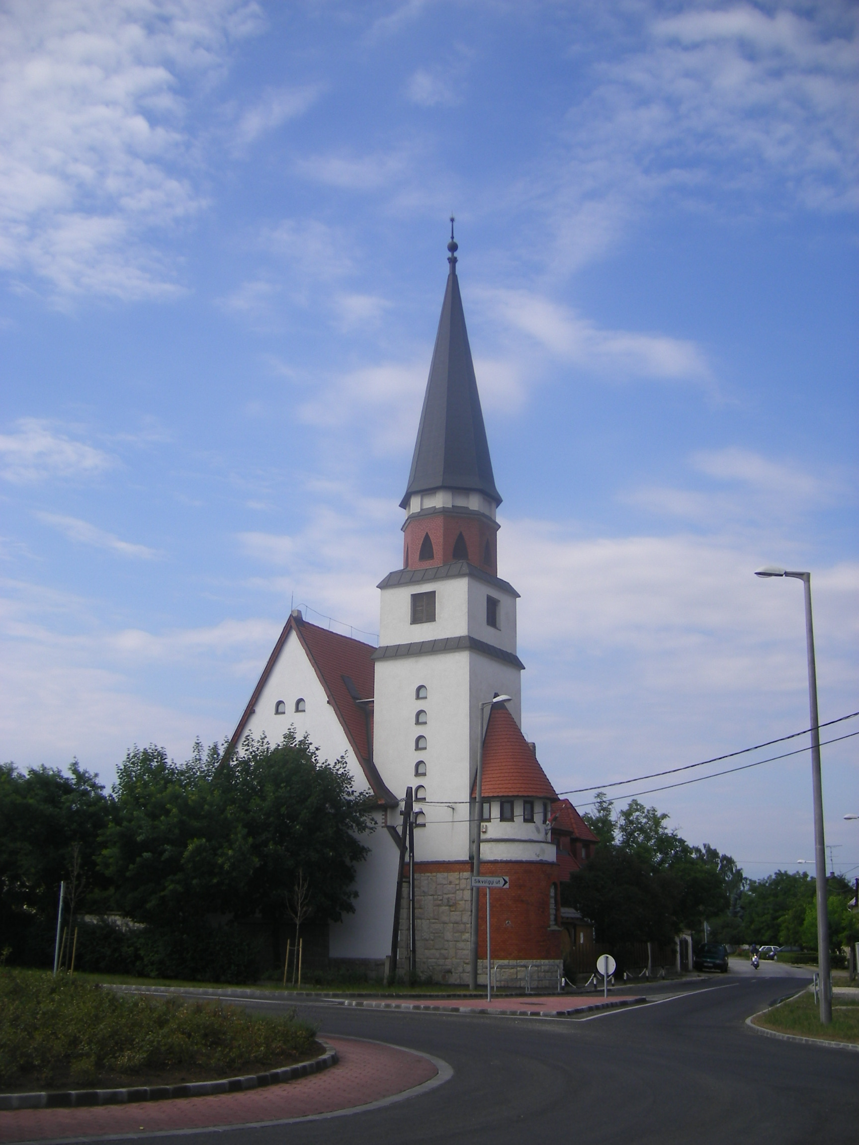 Bánhida - református templom